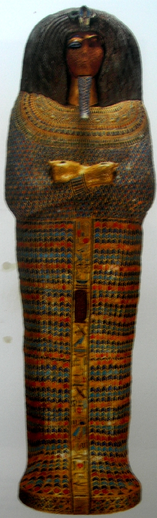 Ataud encontrado en KV55